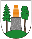 znak obce